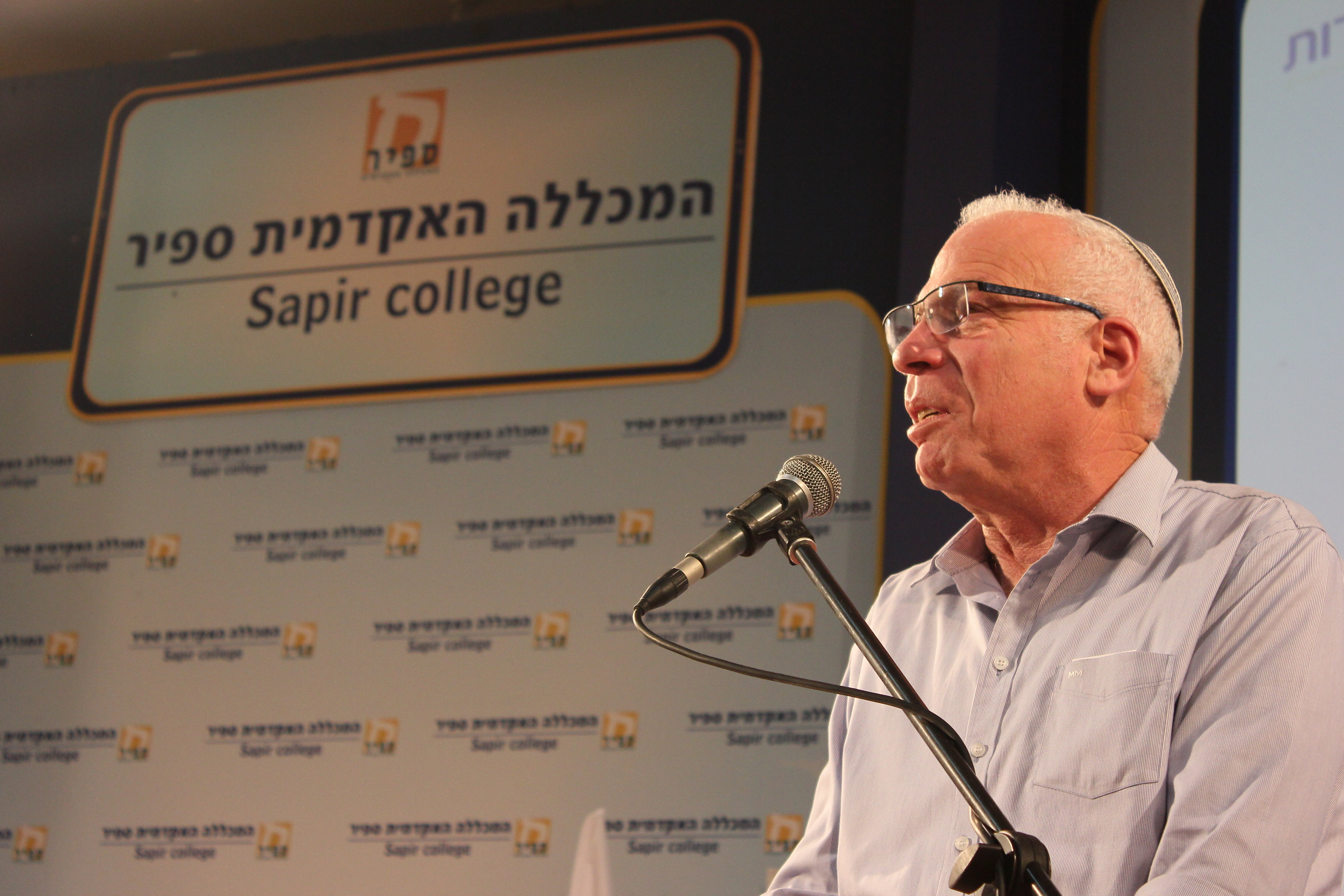 כנס שדרות לחברה במכללה האקדמית ספיר ובעיר שדרות 2015